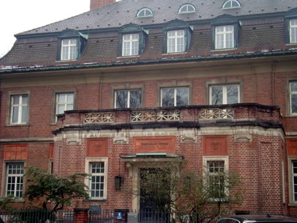 Maria-Josepha-Str. 8, München-Schwabing, Adressverlag